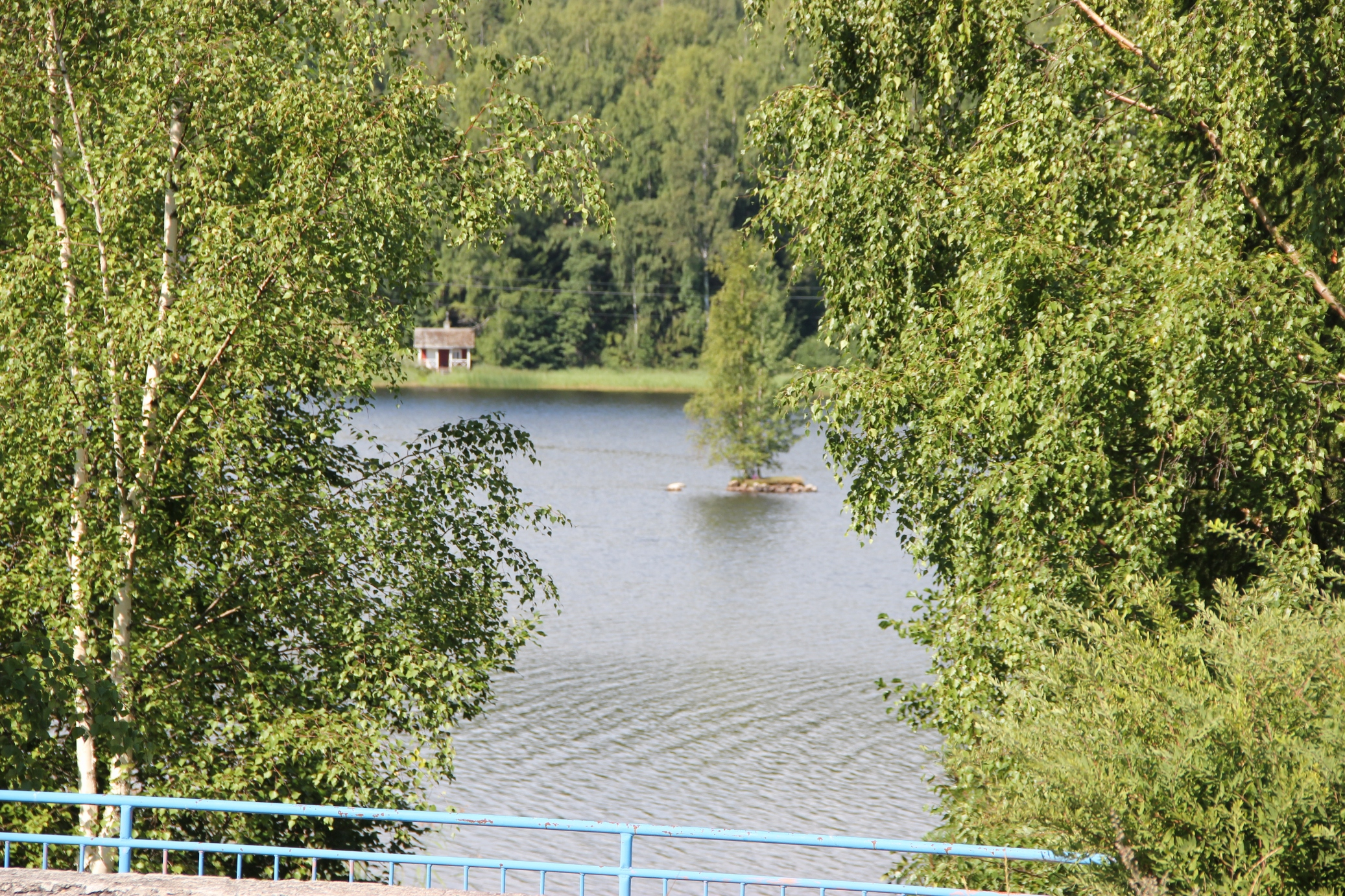 Lahnajärvi (Salo) August 2013